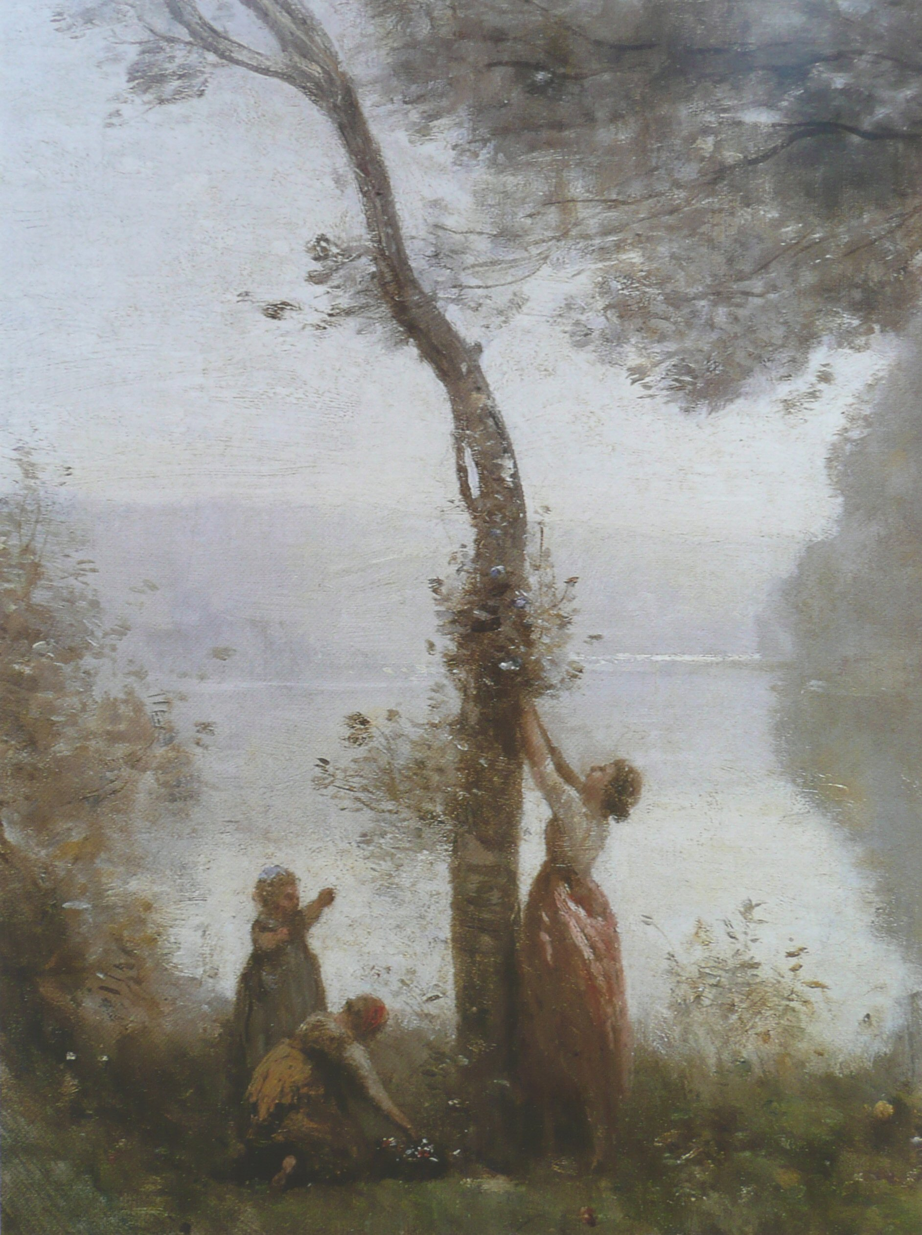 detail